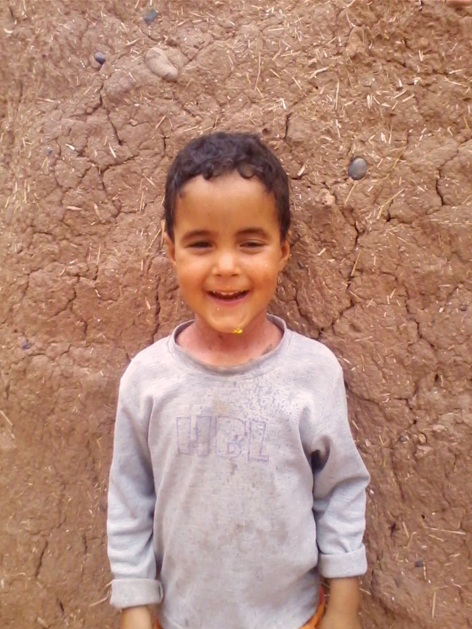 طفل بدوي